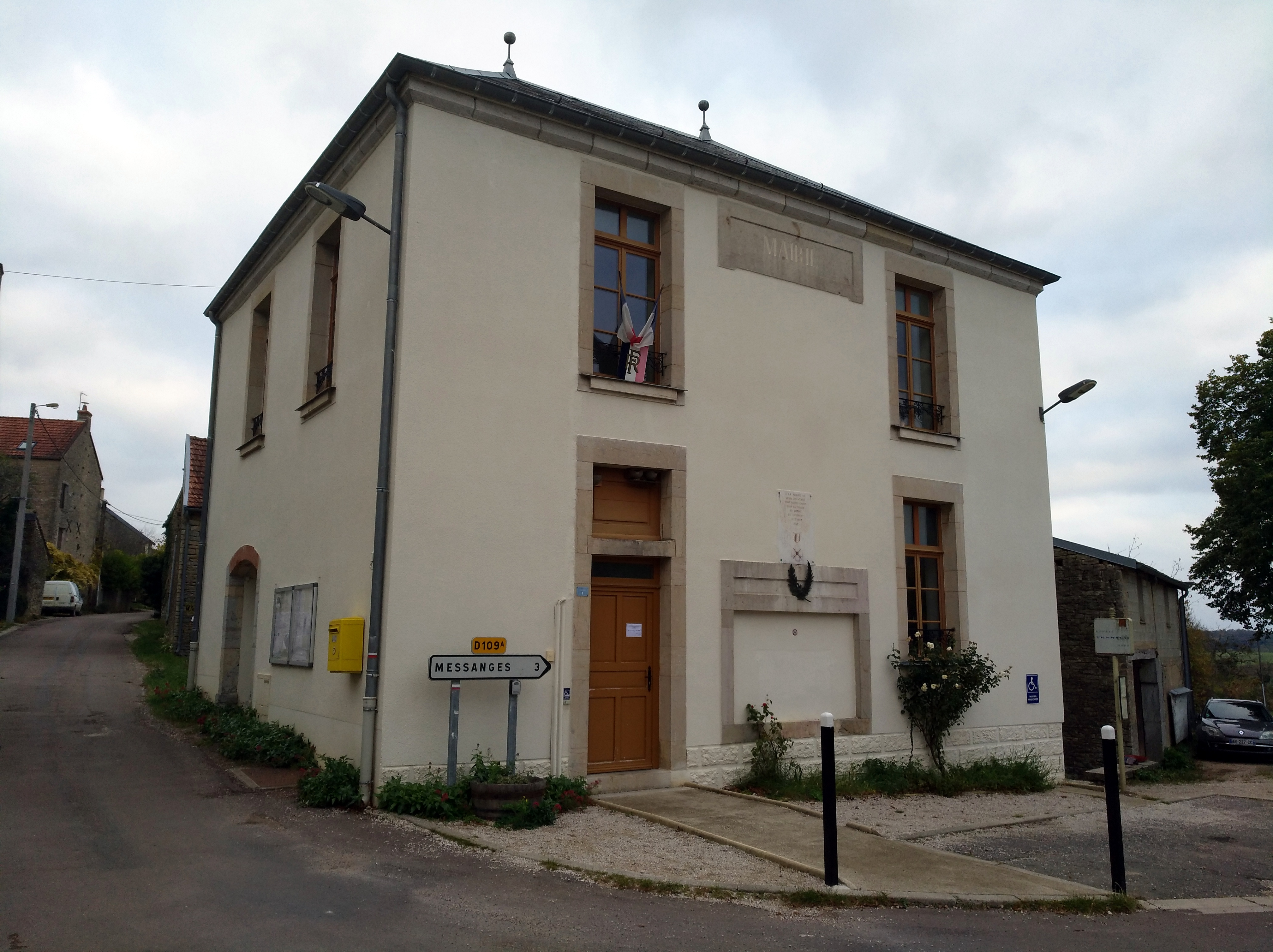 Mairie de Bévy (Côte-d'Or, France).